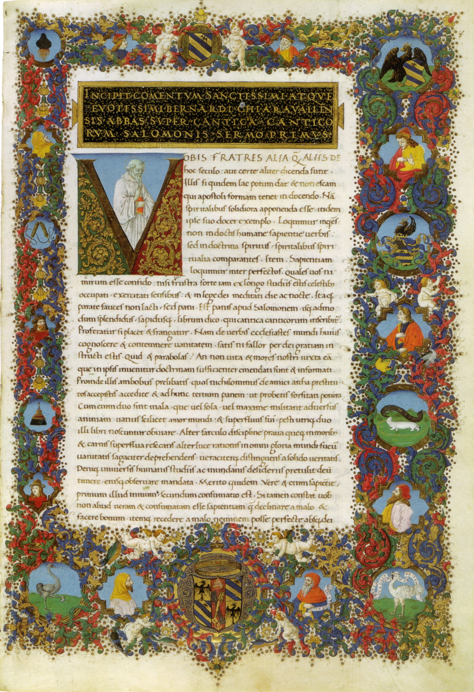 Francesco rosselli e maestro dell'iliade medicea, san bernardo e gilberto di hoyland, sermones in canticorum ms. urb lat 93 f 8r